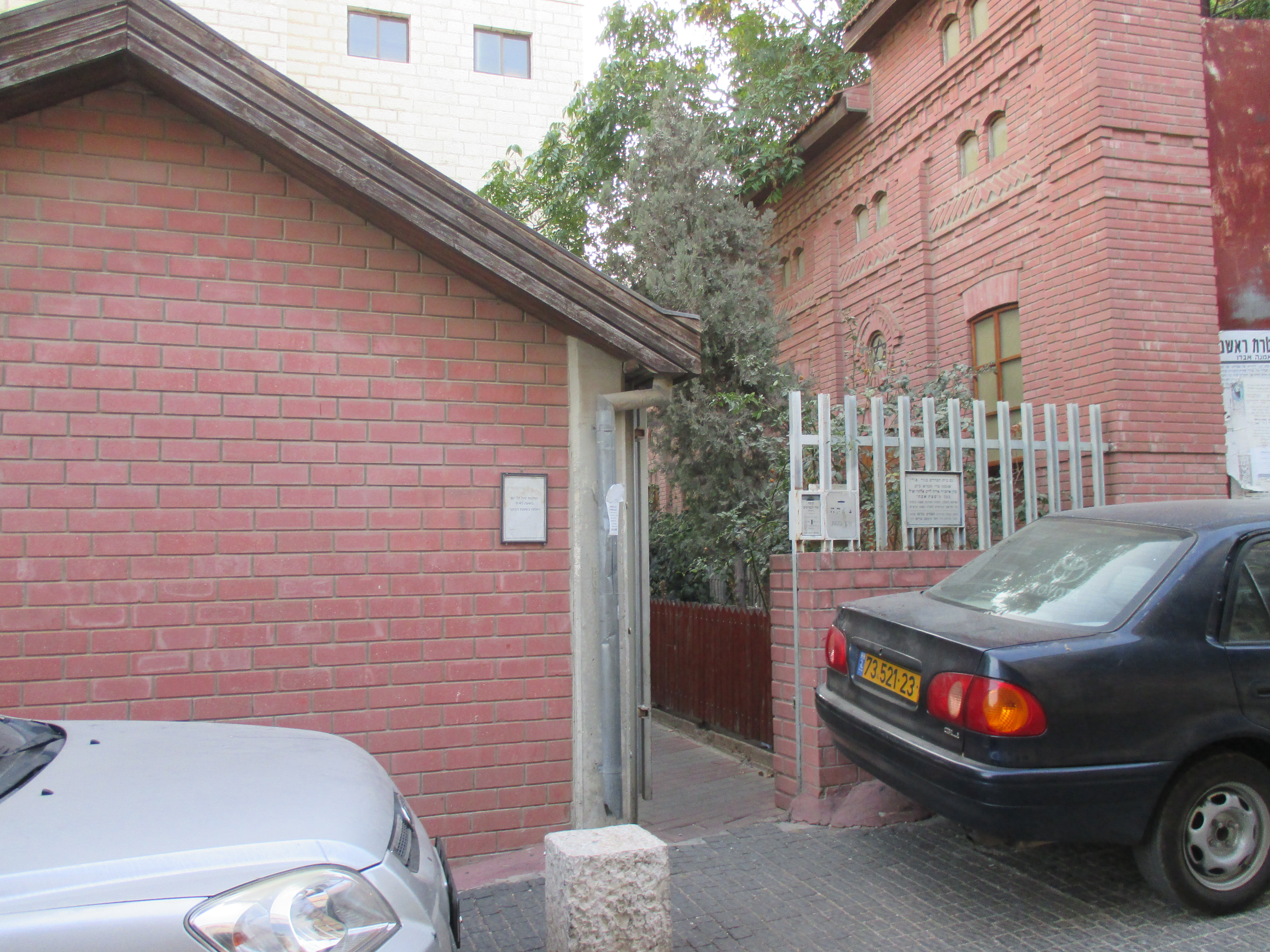 הכניסה לקבר הרבי מגור